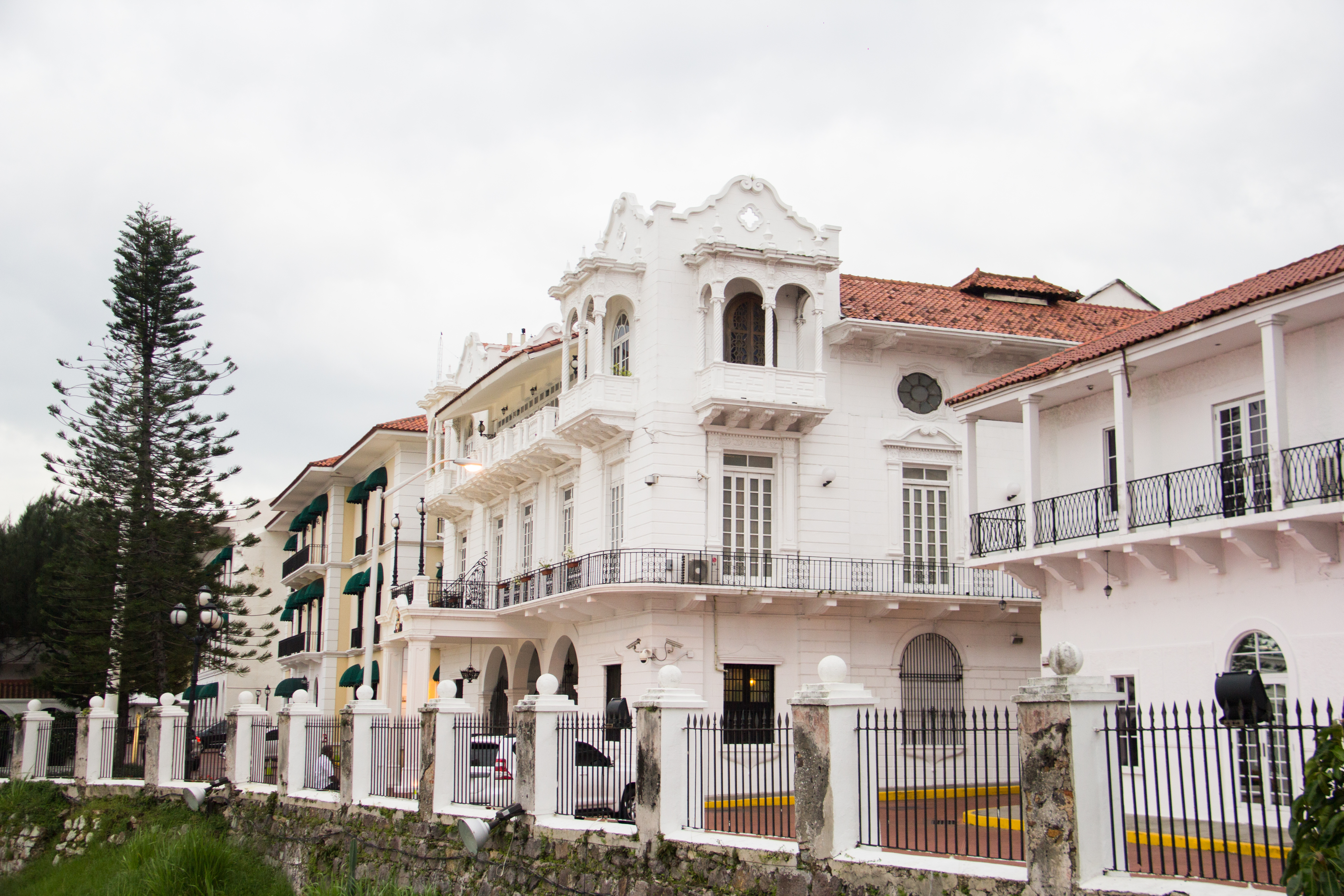 El Palacio de las Garzas es la sede del Poder Ejecutivo de la República de Panamá. Dentro se encuentra el despacho del presidente, así como su residencia oficial. El edificio está ubicado en la avenida Eloy Alfaro, del Casco Antiguo de la ciudad Panamá, corregimiento de San Felipe. A la entrada del palacio encontramos un patio con una fuente central, piso de mármol blanco y columnas de nácar. Este patio alberga las garzas que dan nombre al monumento. Estas garzas, traídas del Darién, fueron obsequiadas por el poeta Ricardo Miró al presidente Belisario Porras.3 Las garzas no han sido siempre las mismas y por lo general siempre hay una por cada provincia del país (al crearse Panamá Oeste, debieron aumentar a 10). Cuando el palacio es centro de actos o sede de cumbres y hay mucho personal, las garzas grises son trasladadas hacia el parque municipal Summit, ubicado en Gamboa